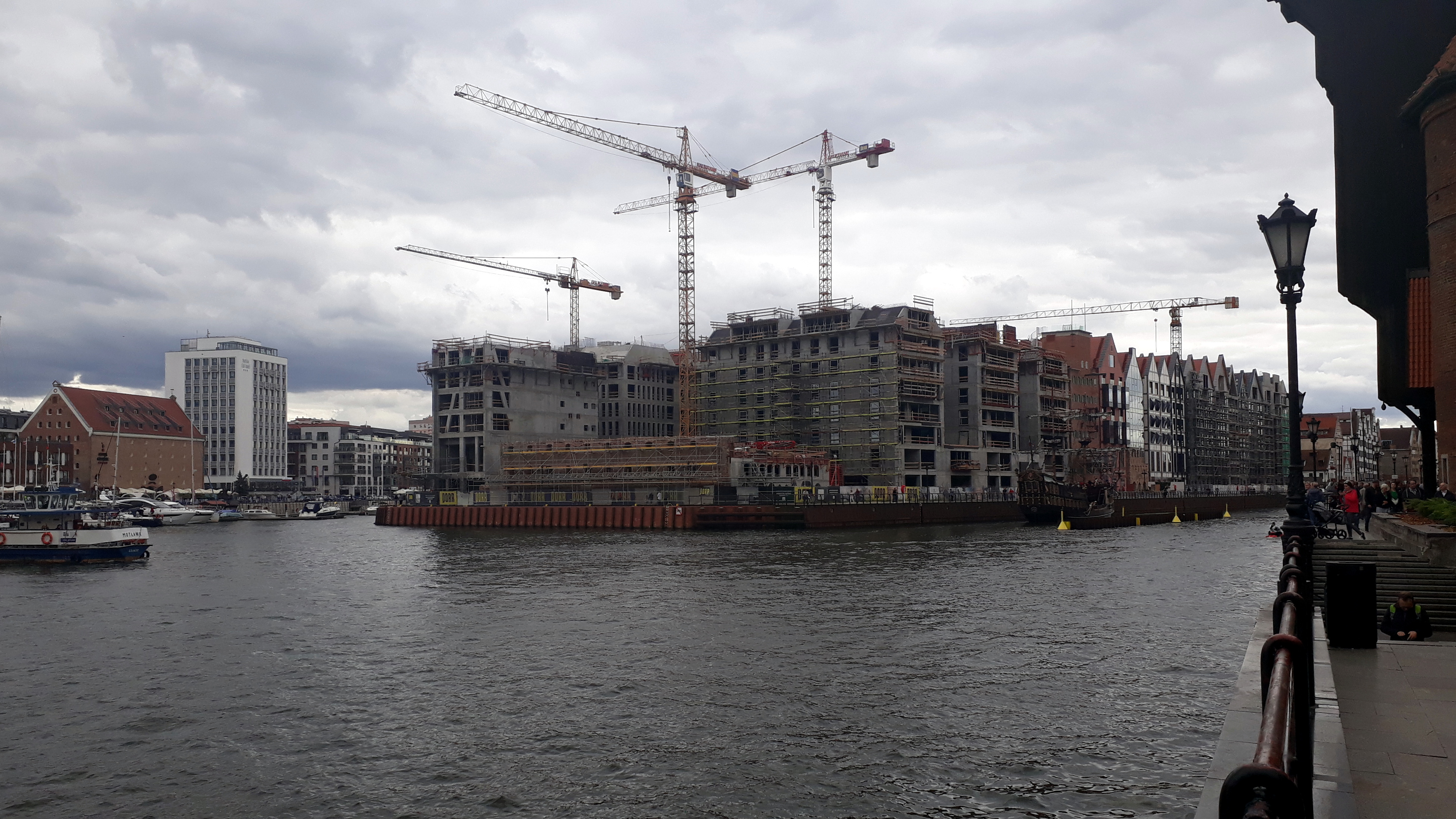 Motława / Wyspa Spichrzów w Gdańsku